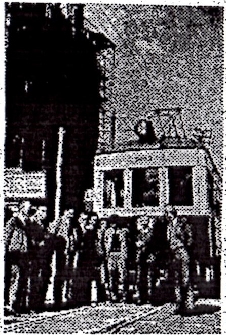 笹津線乗入試運転に臨む富山市議会議員と説明する長井取締役